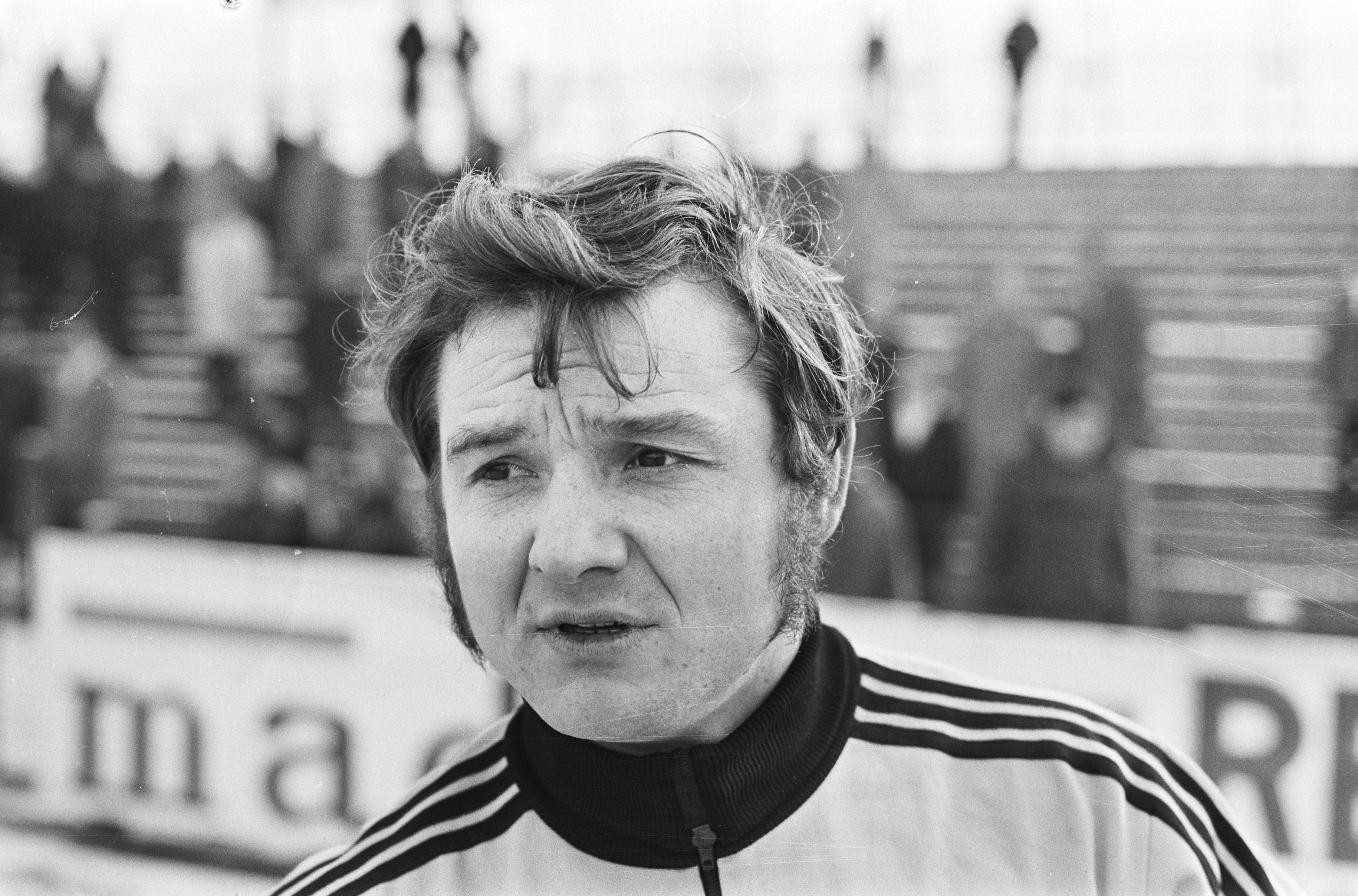 Collectie / Archief : Fotocollectie Anefo Reportage / Serie : [ onbekend ] Beschrijving : Nederlands elftal tegen elftal van in Nederland voetballende buitenlanders; Willy Lippens , kop Datum : 27 december 1970 Trefwoorden : sport, voetbal Fotograaf : Evers, Joost / Anefo Auteursrechthebbende : Nationaal Archief Materiaalsoort : Negatief (zwart/wit) Nummer archiefinventaris : bekijk toegang 2.24.01.05 Bestanddeelnummer : 924-1297